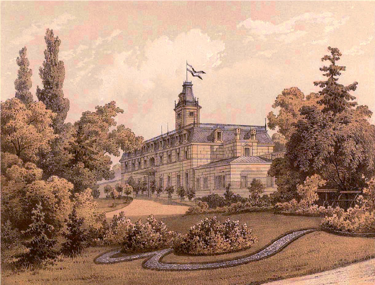 Schloss Gütergotz, Ansicht des ursprünglich 1804/05 von David Gilly errichteten Baus nach seinem ersten vollständigen Umbau. Aus: Duncker, Alexander (Hg.), Die ländlichen Wohnsitze, Schlösser und Residenzen der ritterschaftlichen Grundbesitzer in der preußischen Monarchie [...], Bd. 3, Reg.-Bez. Potsdam.